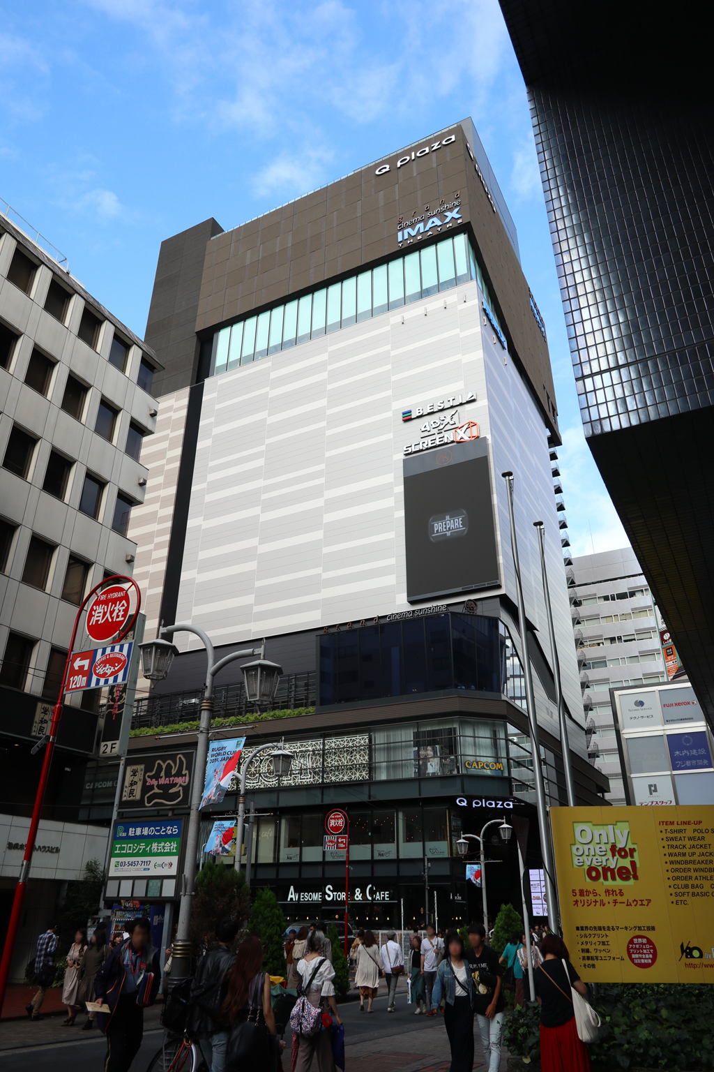 キュープラザ池袋